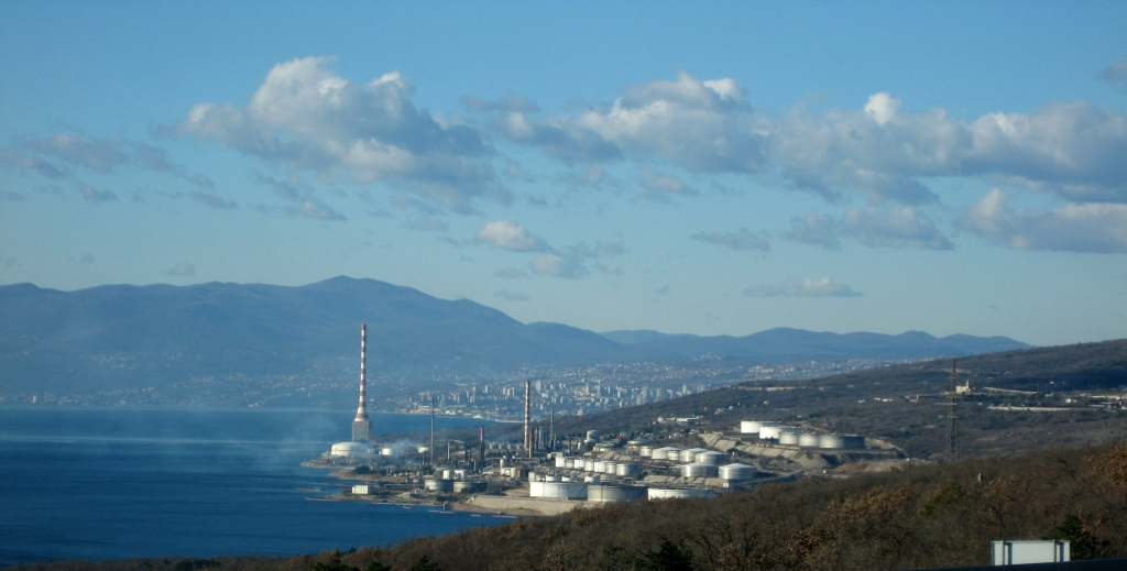 Pogled na Urinj i Rijeku